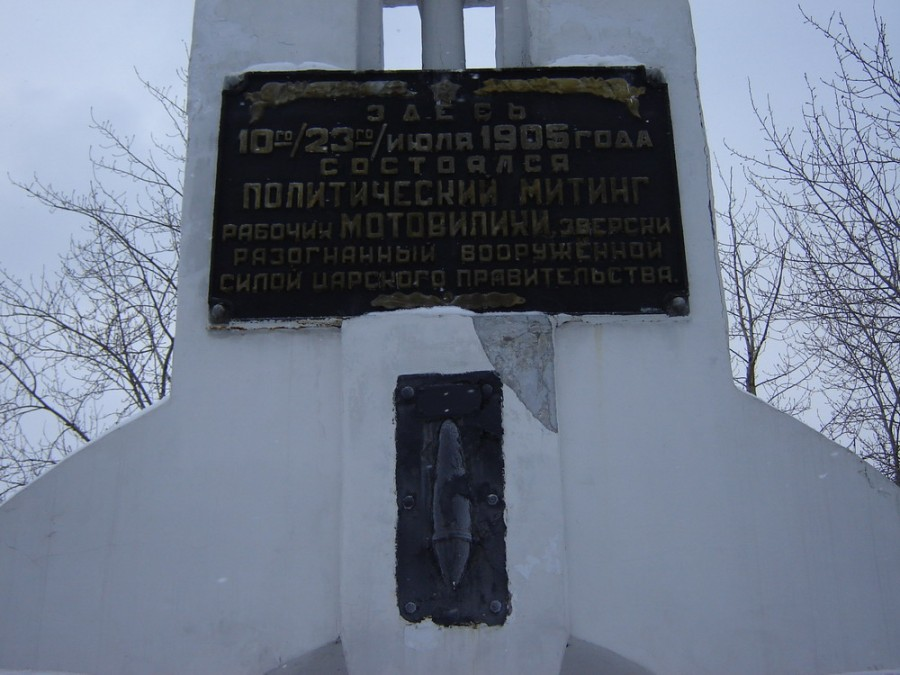 Мемориальная доска в память разогнанного митинга на горе Вышке. Мотовилихинский район г. Перми